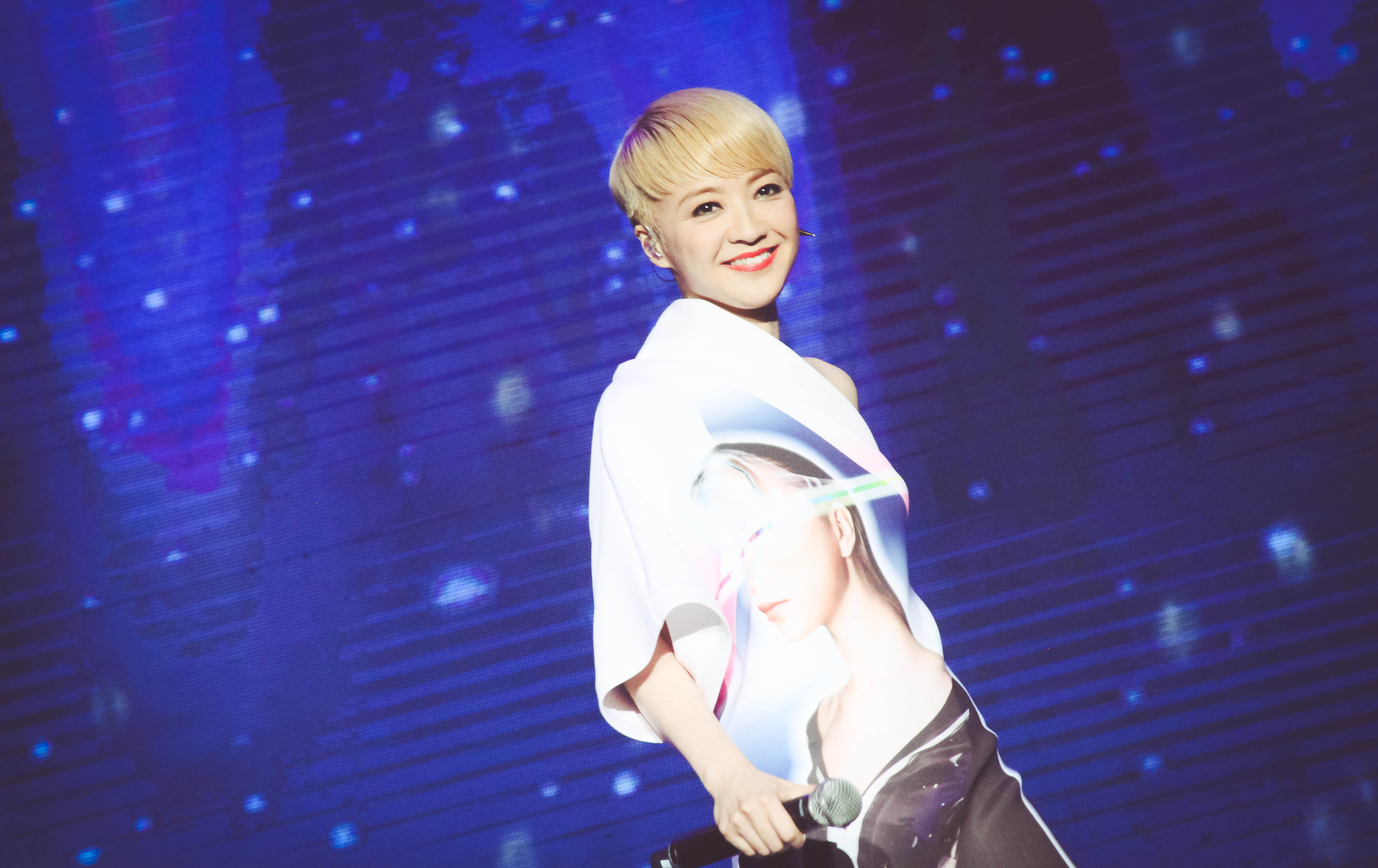 期待已久，寶麗金永恆金曲演唱會PolyGram Forever Live將會在7月於新加坡矚目登場！2013年是樂壇的盛事之年，除了張國榮、黃家駒、鄧麗君等多位樂壇巨人的紀念年外，更是叱吒中文樂壇三十年、昔日唱片界一哥寶麗金PolyGram重臨香江的大日子。寶麗金仝人為慶祝榮譽歸來，特地召集昔日旗下多位巨星級人馬為這個寶麗金巡迴演唱會大顯昔日功架。 演出陣容十分鼎盛包括陳慧嫻、陳曉東、關淑怡、王馨平、達明一派。這五組藝人通通都是幾代流行樂迷熟悉的「寶記」巨星，更是不少人的頭號偶像。這個演唱特別感人之處好像回到了昔日寶麗金時期，各人聚首一堂，重拾以往寶記的回憶。 寶麗金label是大家的集體回憶，藉著這個《PolyGram Forever Live》，讓一眾引頸以待的樂迷透過一首又一首金曲重拾舊日對寶麗金情懷，渡過了一個美滿金曲夜。 寶麗金永恆金曲演唱會- 新加坡站將在7月19日，晚上8點位於新加坡室內體育館隆重引爆。 寶麗金永恆金曲演唱會 - 新加坡站是由AMC Live Group荣誉呈现。 Location: Singapore Indoor Stadium